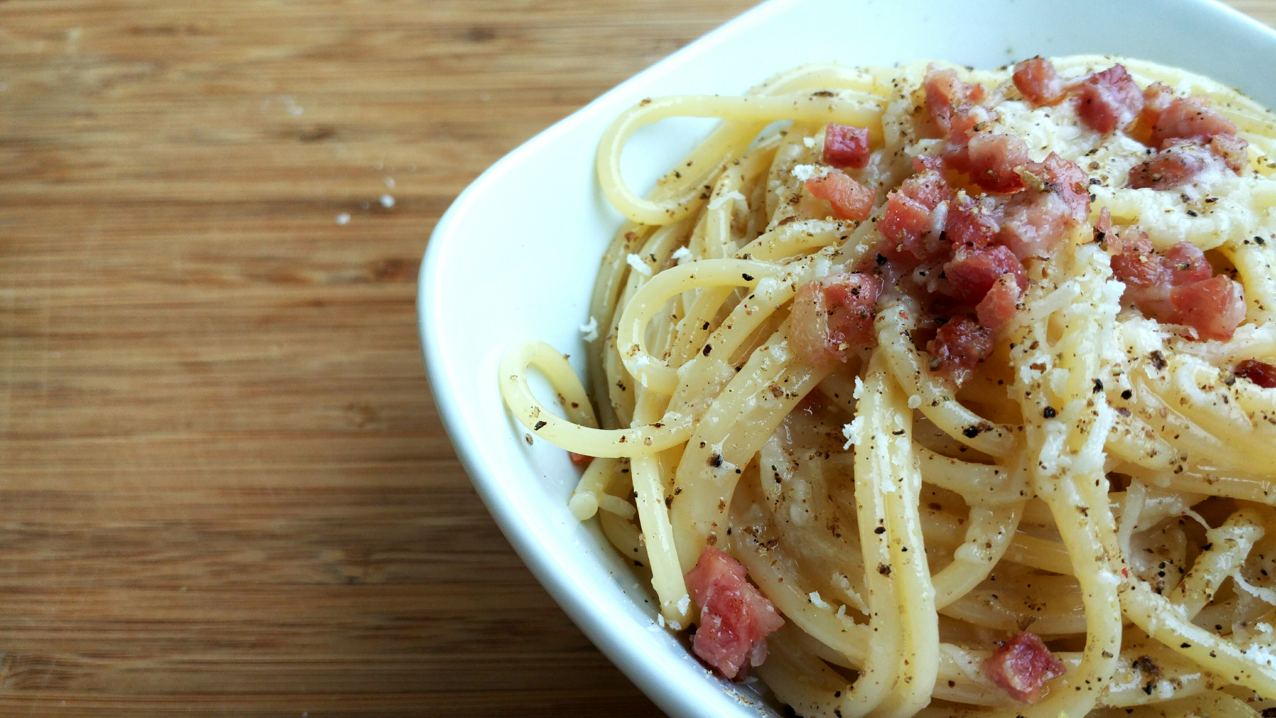 spaghetti alla carbonara (closeup view)